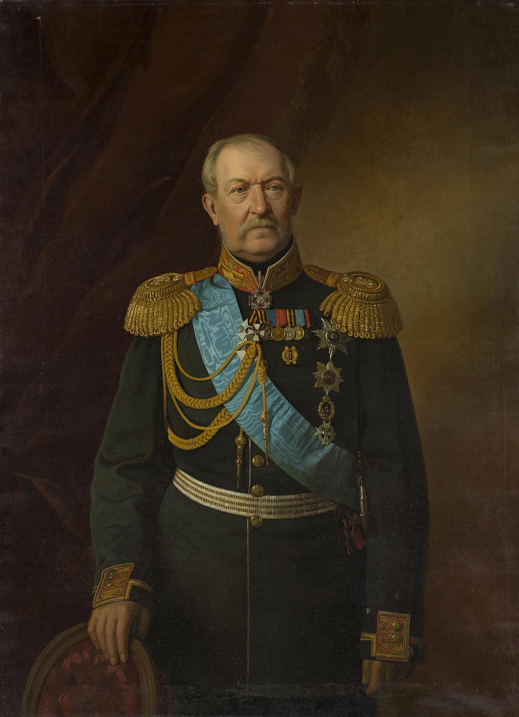 Картина «Портрет Павла Николаевича Игнатьева» — художник Егор (Георг) Иванович Ботман, русский придворный живописец, портретист, академик Императорской Академии художеств.